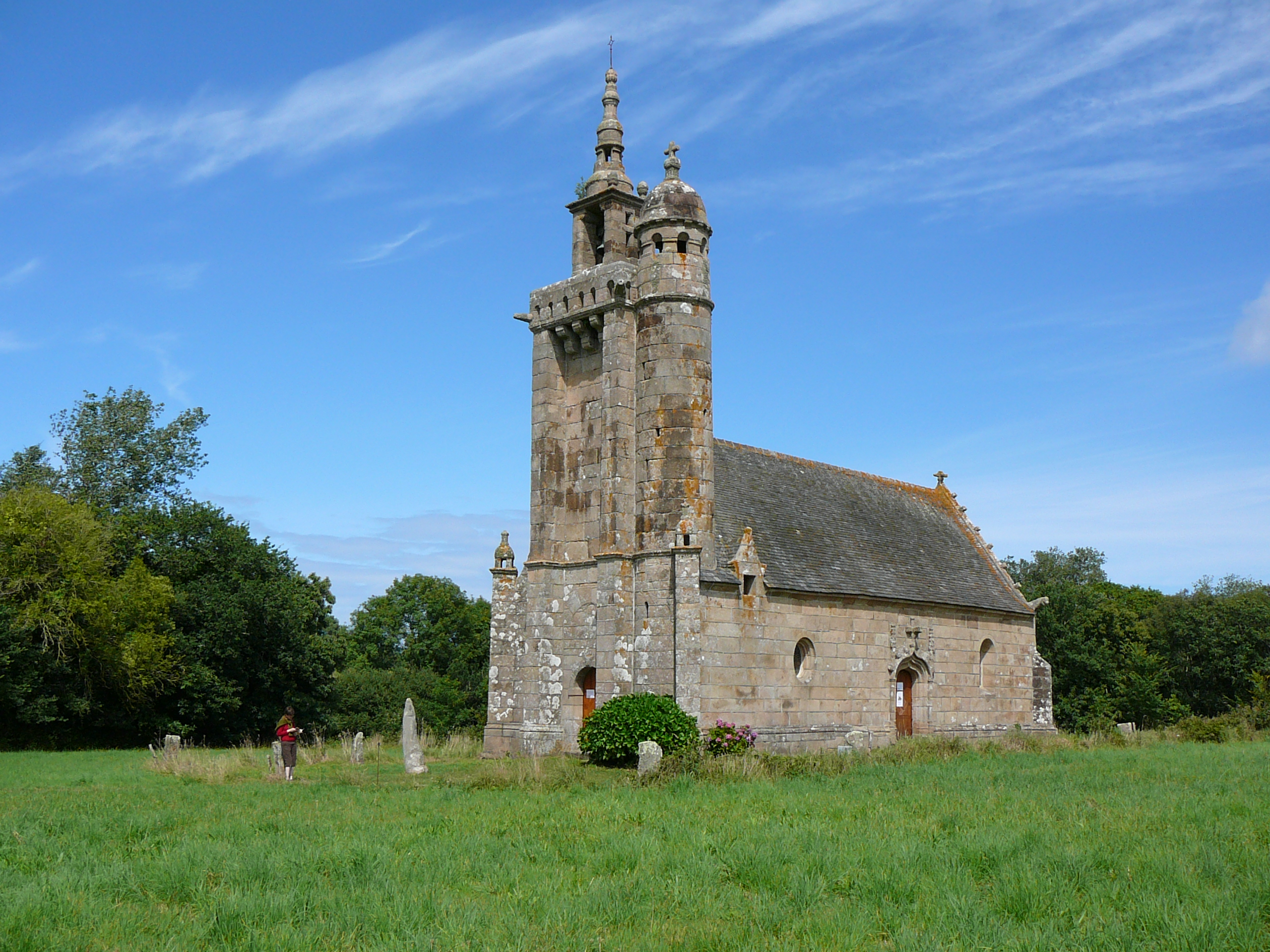 Chapelle de Saint Samson, commune de Pleumeur Bodou (22)